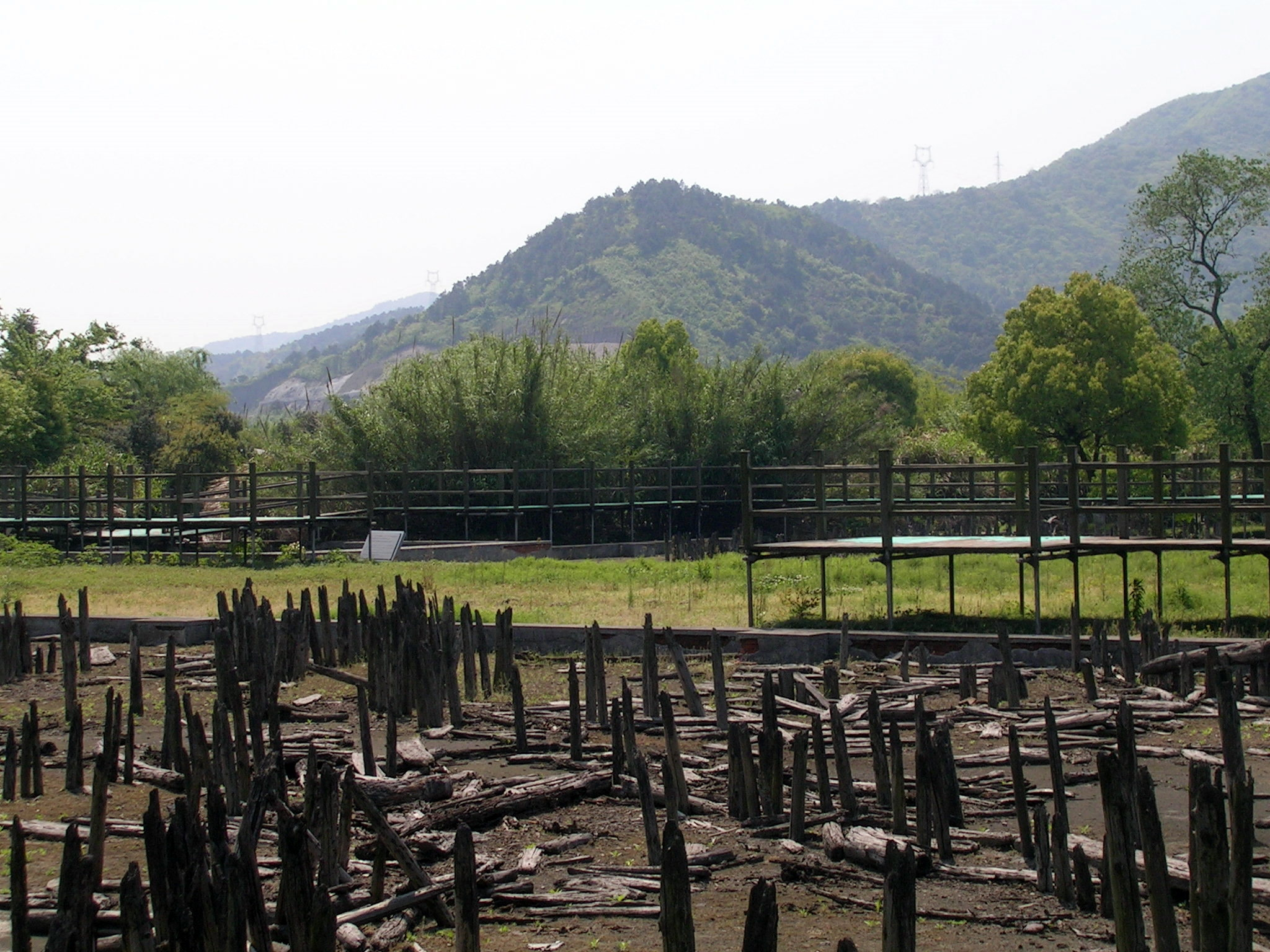 河姆渡遗址发掘现场